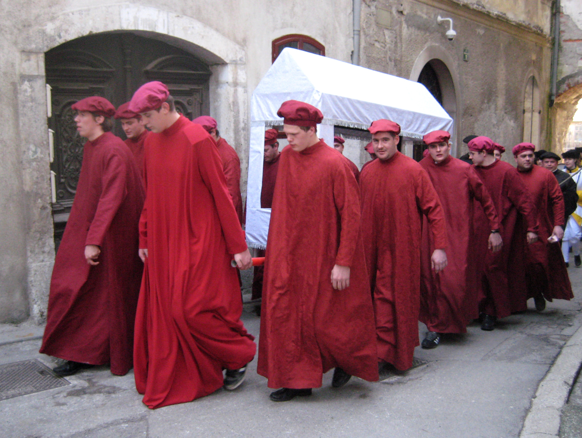 Škofjeloški pasijon (Processio Locopolitana), izvedba 2009 v Škofji Loki